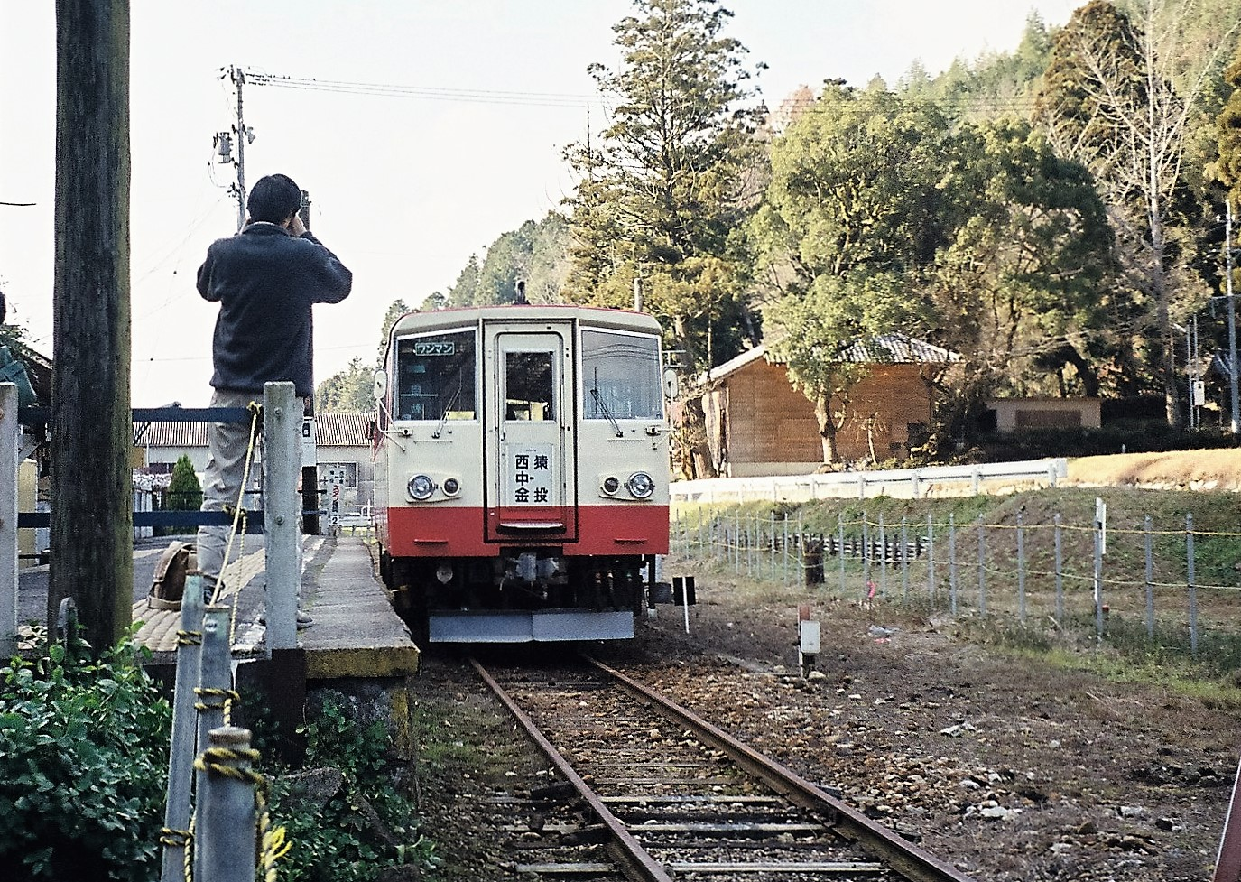 名鉄三河線西中金駅に停車中の猿投行き名鉄キハ20形気動車